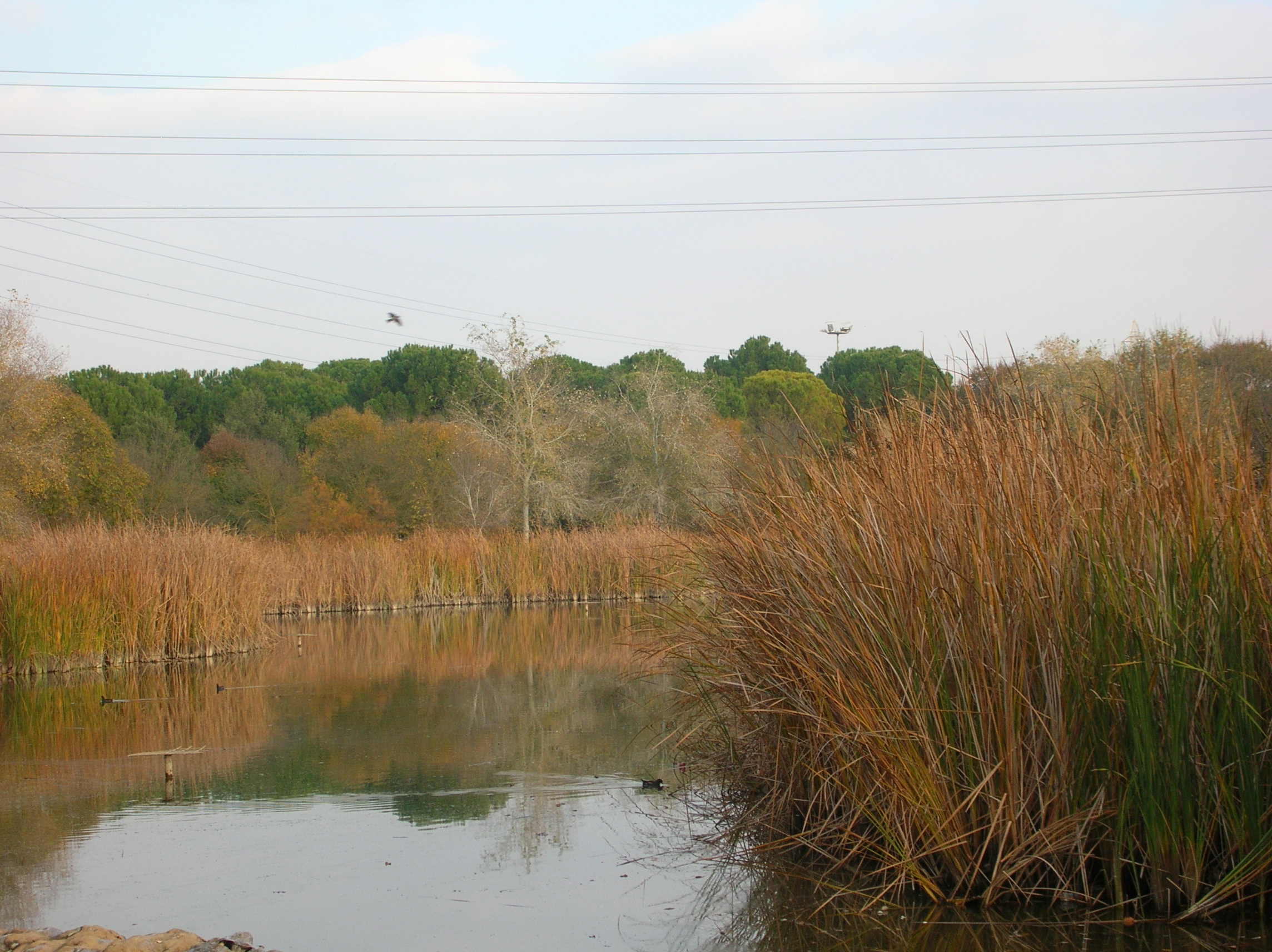 Un des deux lacs du parc de l'Alamillo, Séville, Espagne